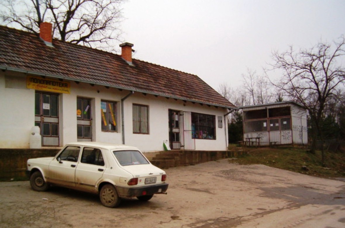 Средиште Калиновца.